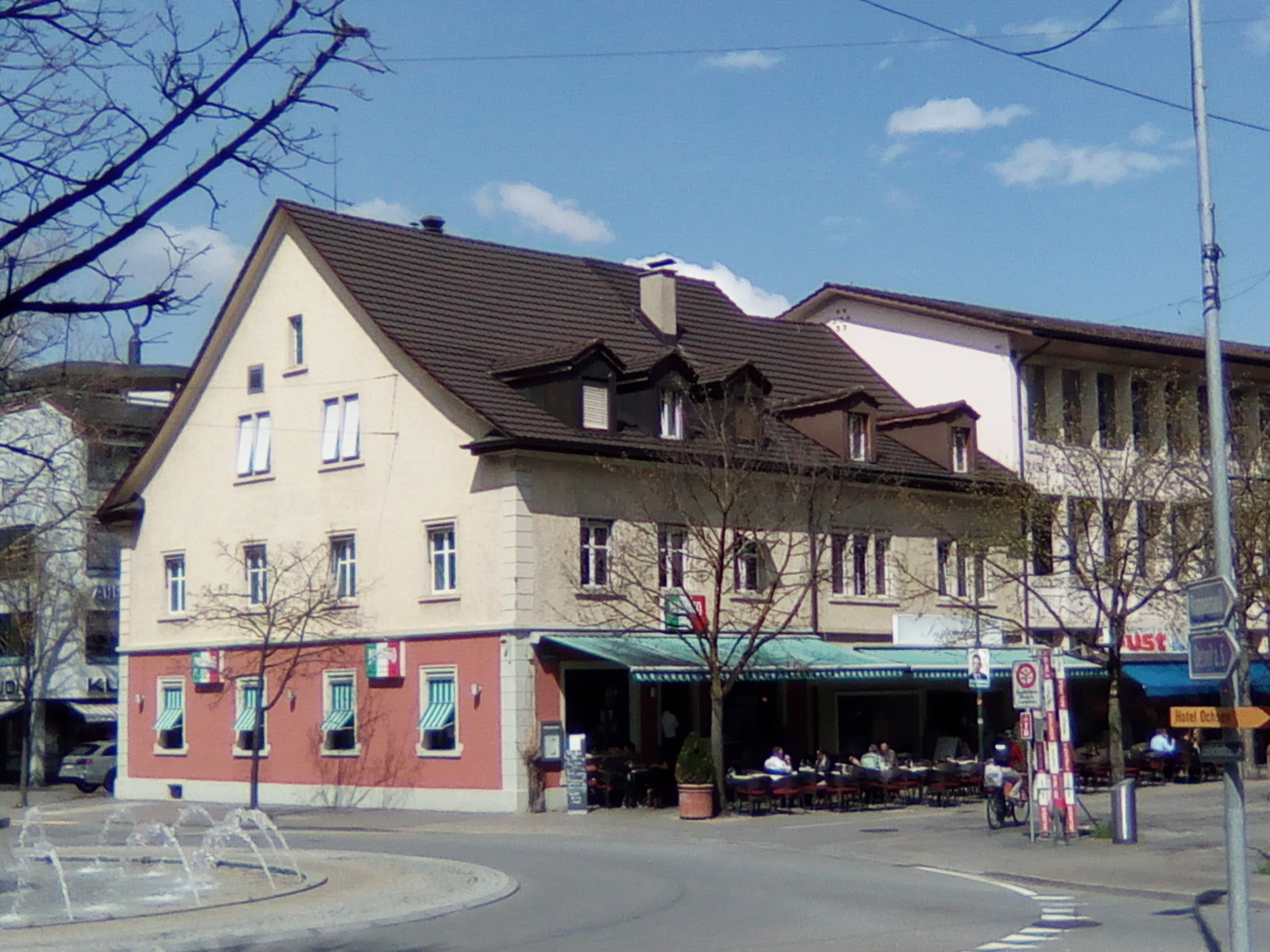 Brunnen-Kreisel in Uster an der Poststrasse 20